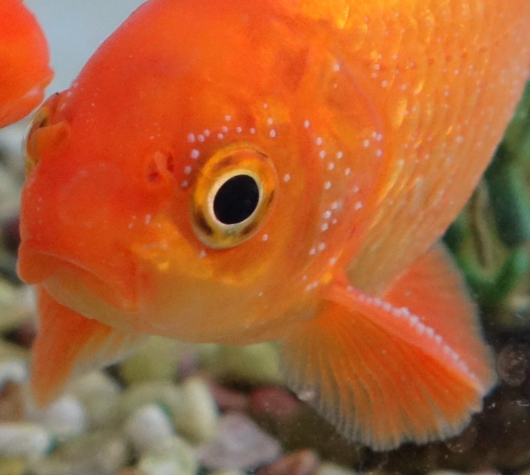 金魚の追星